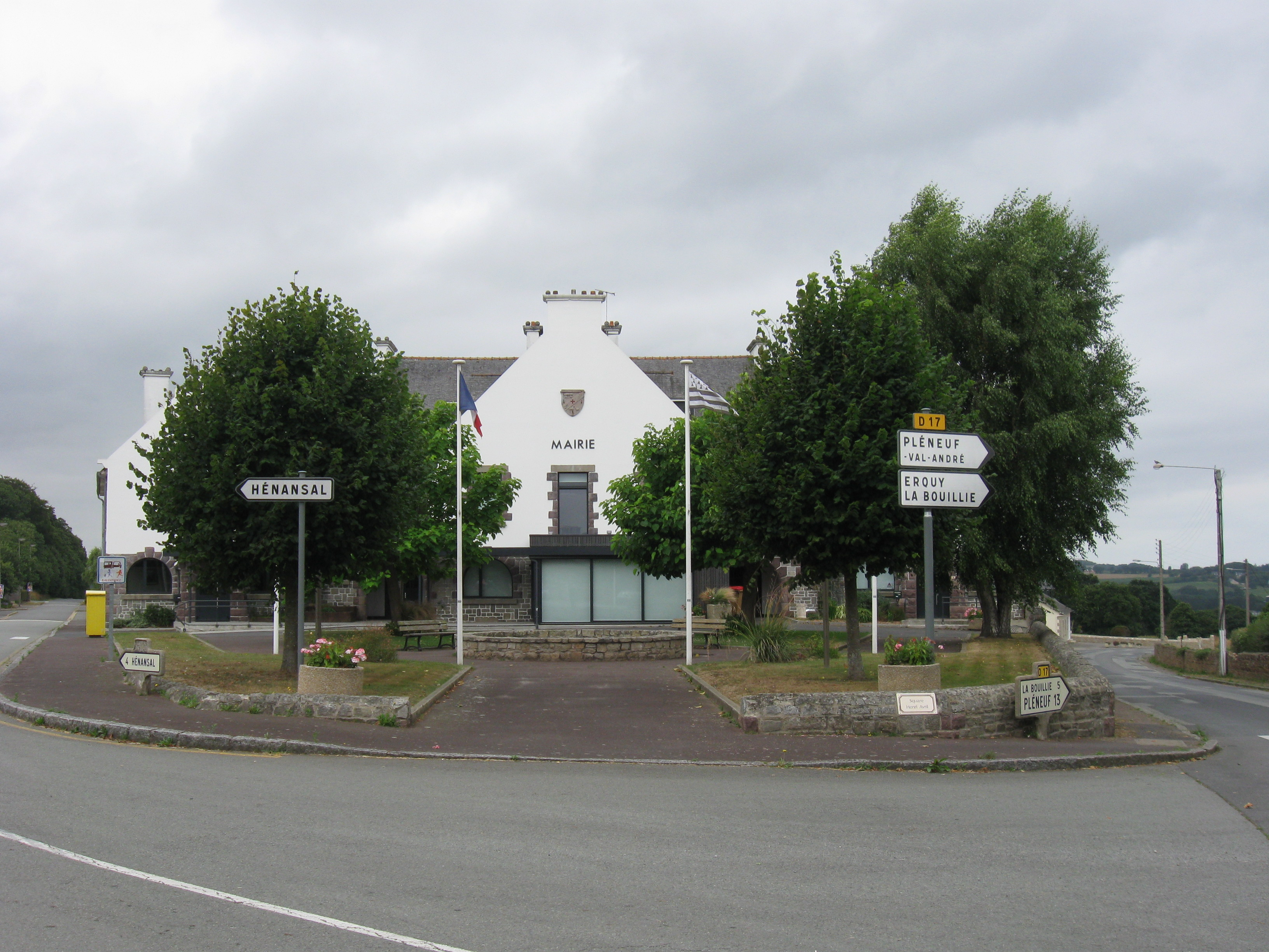 Mairie de Hénanbihen. (Côtes-d'Armor, région Bretagne).